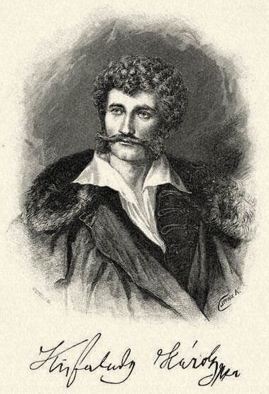 Kisfaludy Károly (1788–1830). Morelli Gusztáv fametszete. Megjelent Az Osztrák-Magyar Monarchia írásban és képben (1887–1901) kiadványban